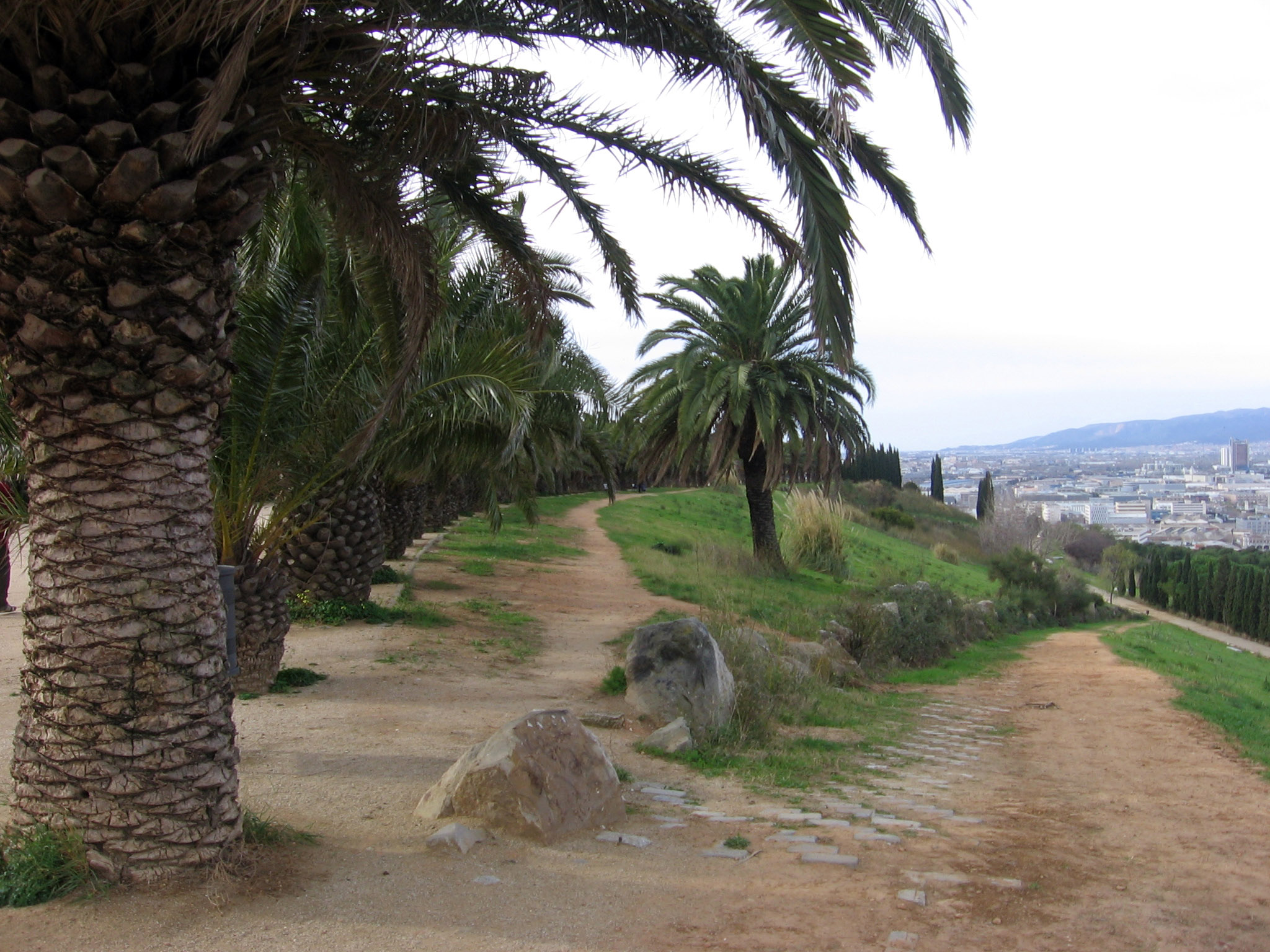 Parque del Mirador del Migdia